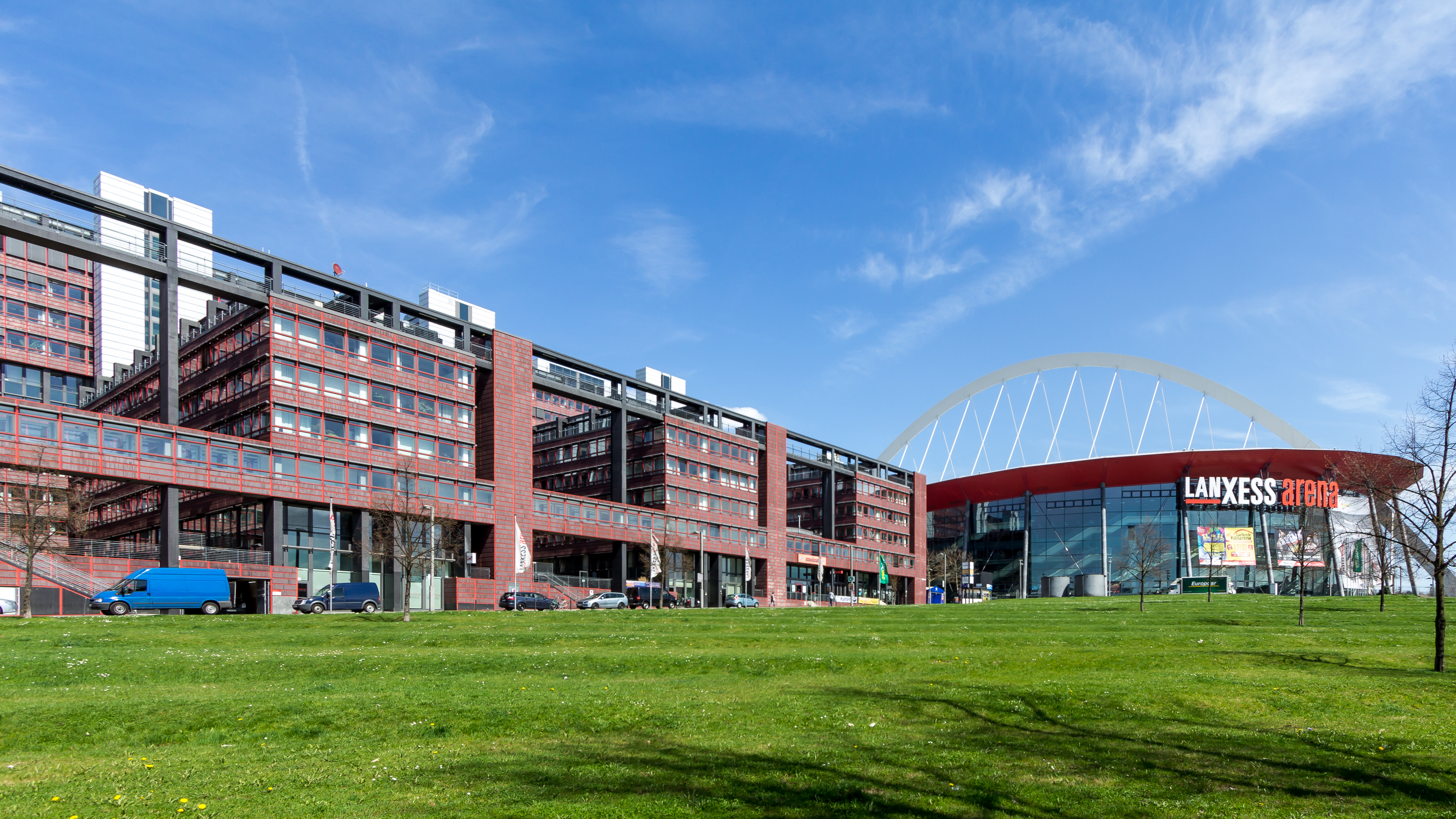 Links: Stadthaus Deutz (Technisches Rathaus), Westgebäude, Köln. Ansicht von Süden. Architekten: Gottfried und Peter Böhm. Bauzeit: 1993–1998. Mitte: Lanxess-Arena (ehemals Kölnarena, im Volksmund auch Henkelmännchen genannt). Architekt: Peter Böhm. Bauzeit: 1996-1998